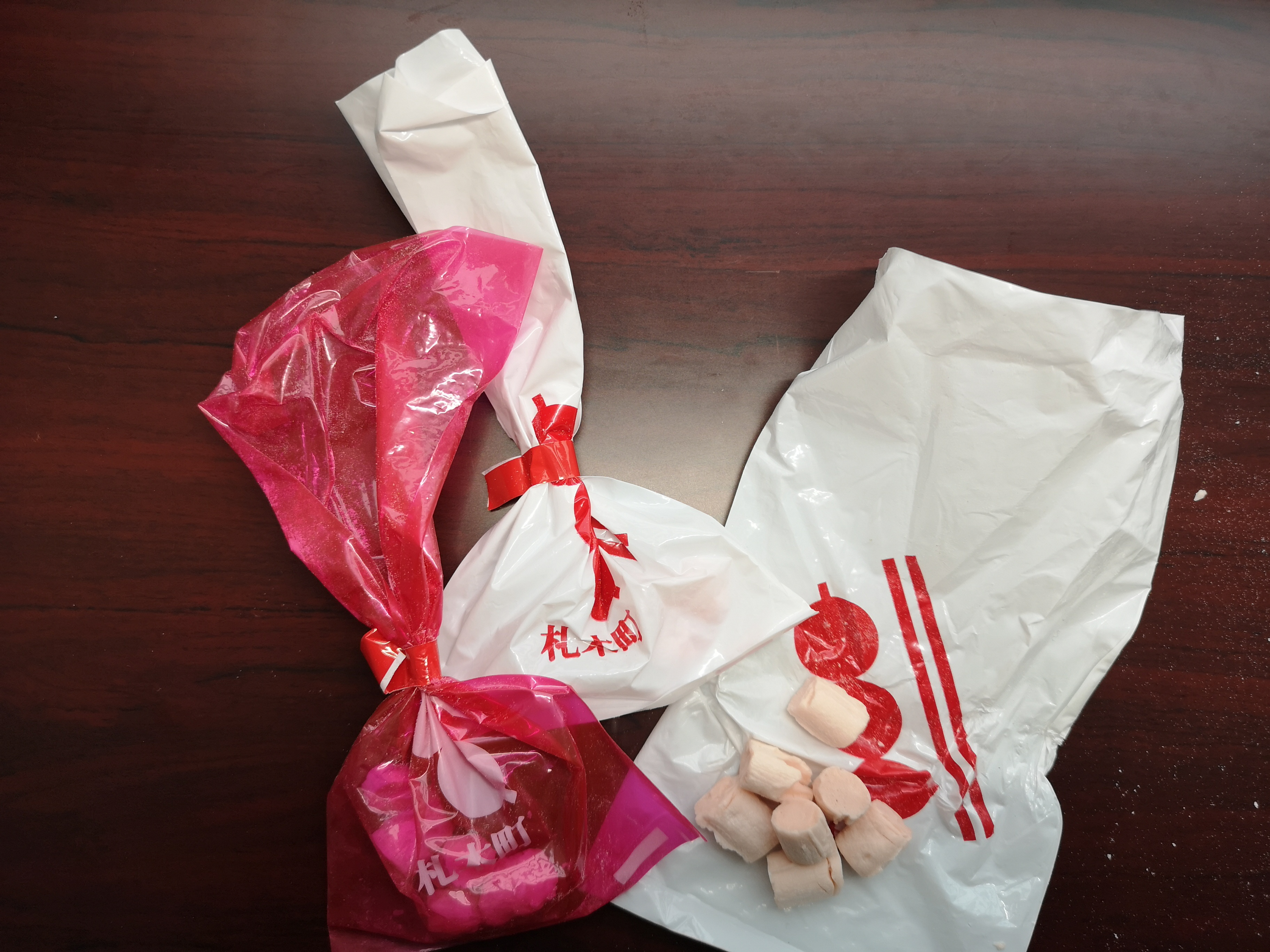 愛知県豊橋市の安久美神戸神明社の例祭「鬼祭」において撒かれるタンキリ飴（札木町）